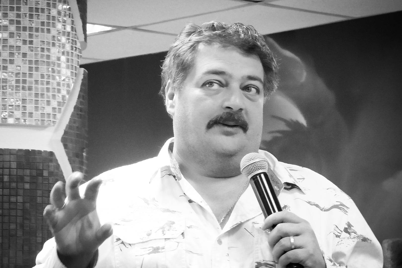 Дмитрий Быков в Московском Доме Книги 20.05.2017.